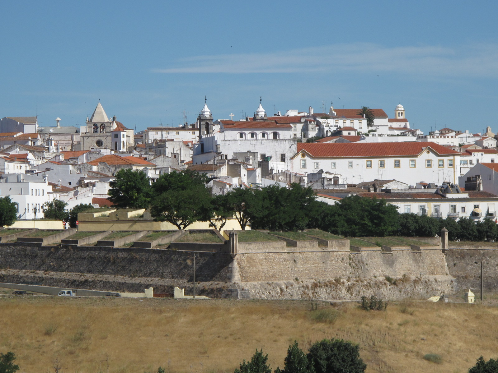 Historisches Zentrum von Elvas mit Bollwerk im Vordergrund